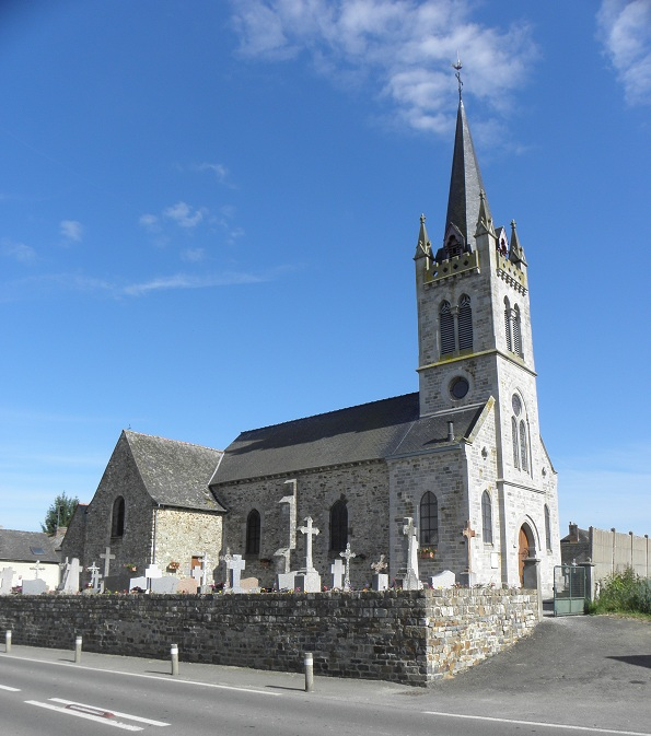 Église Saint-Martin-de-Tours de Chasné-sur-Illet (35).